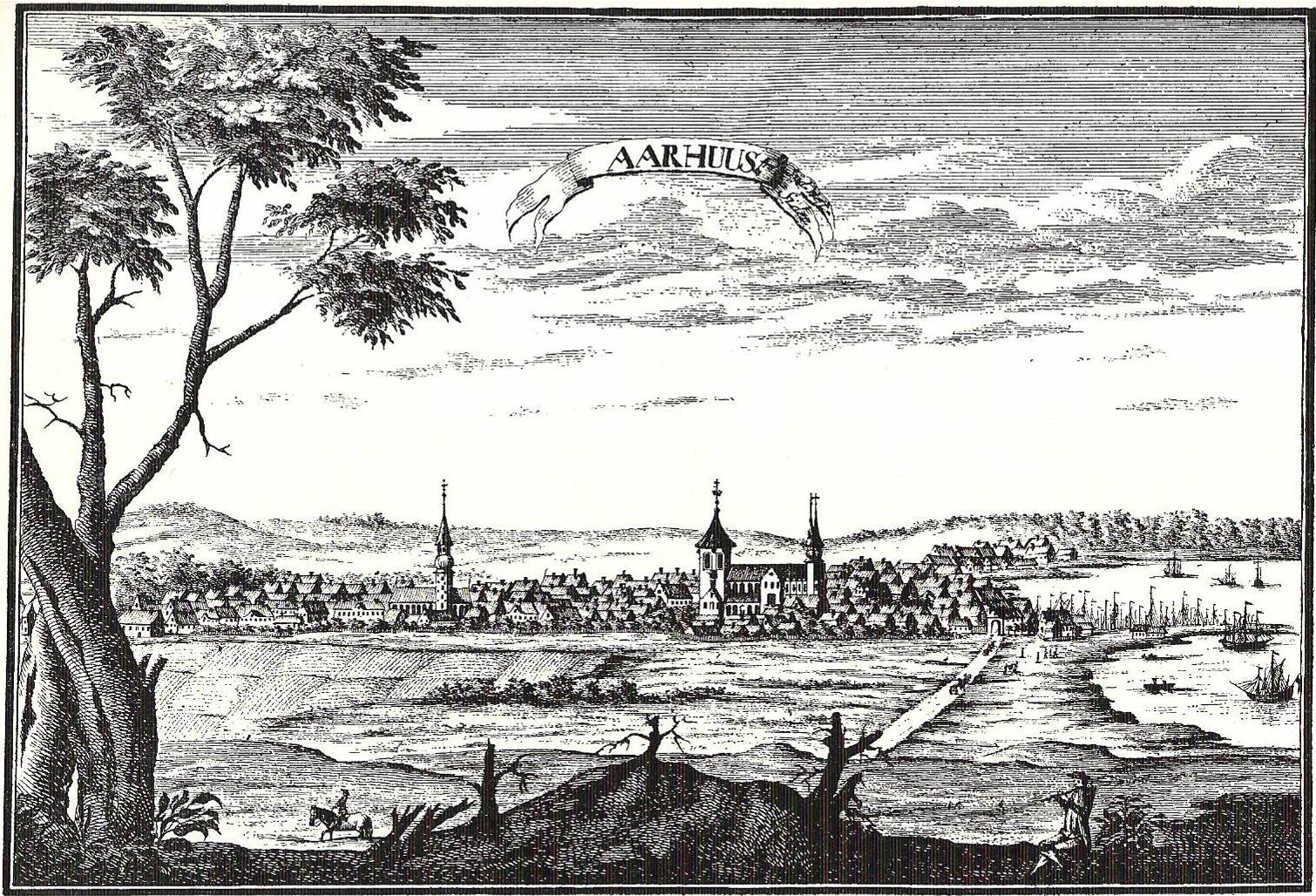 Prospekt af Århus fr Pontoppidans atlas 1768 / View of Aarhus/Denmark 1768